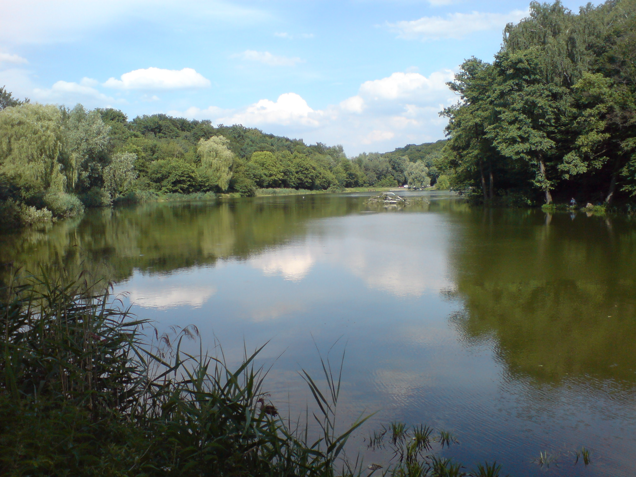 Kiev, Golosiivsky forest, Didorivka lake